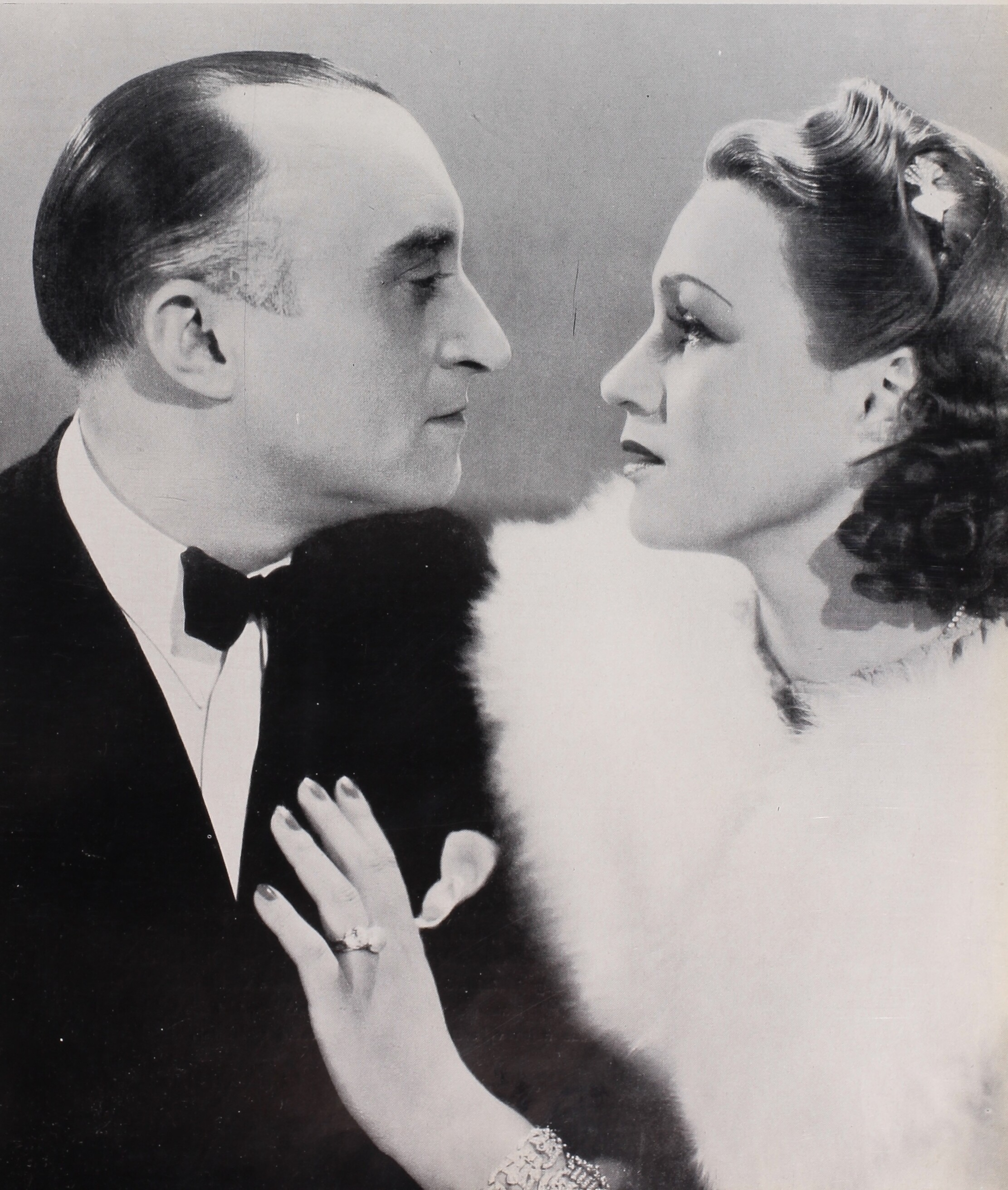 Oldřich Nový a Adina Mandlová na reklamní fotografii filmu Kristian (1939) režiséra Martina Friče